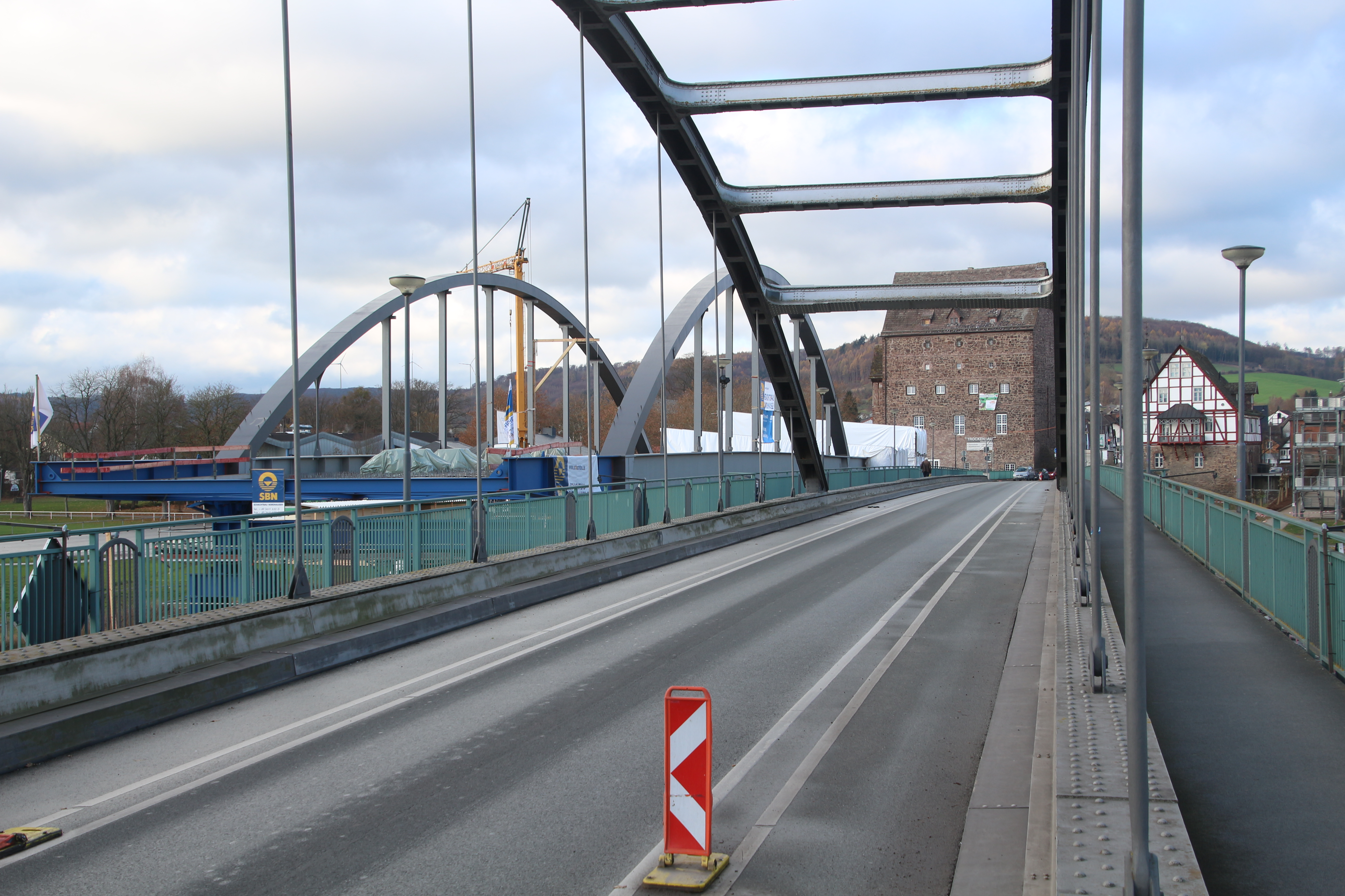 Neubau Weserbrücke zwischen Beverungen und Lauenförde. Ansicht von Lauenförde Richtung Beverungen (im Hintergrund die Burg Beverungen). Rechts die noch im Betrieb befindelicher Brücke; links der Neubau